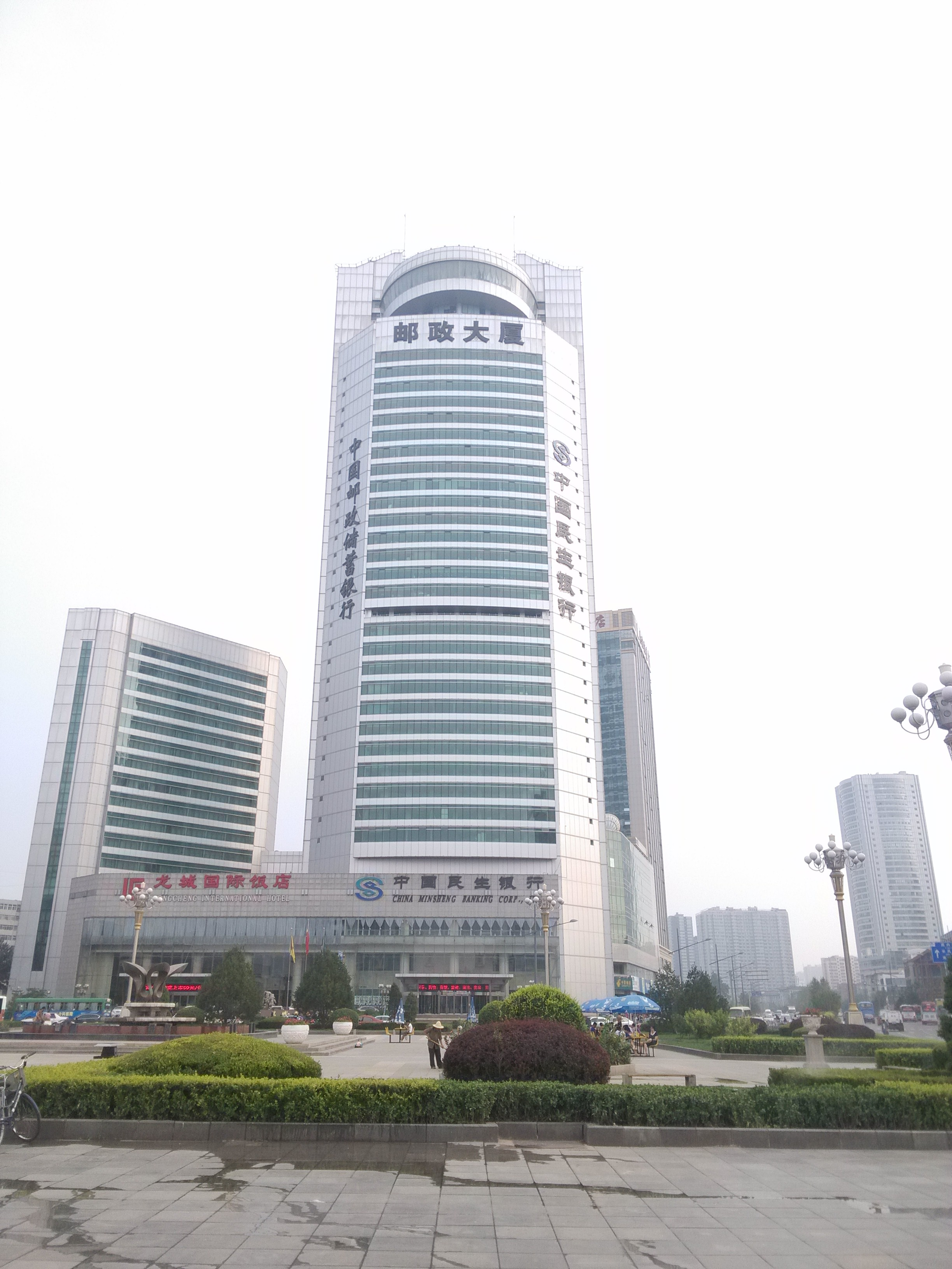 中文（中国大陆）: 山西省邮政公司。